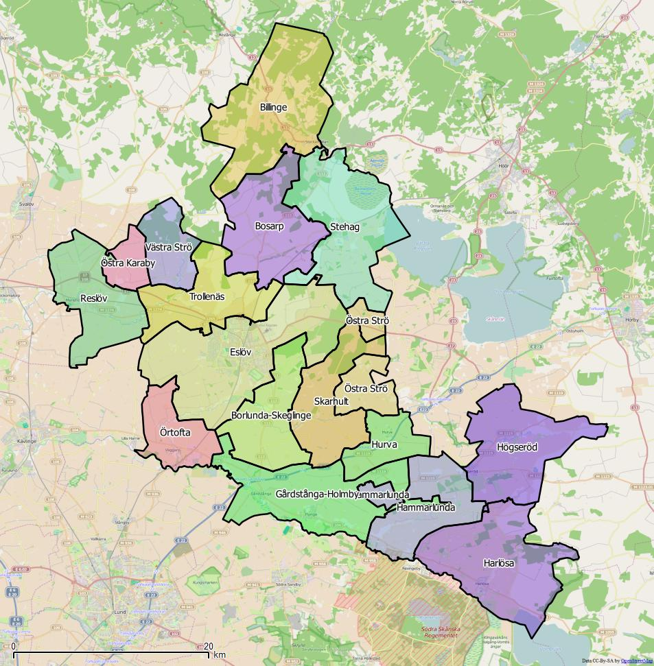 Distriktsindelningen i Eslövs kommun